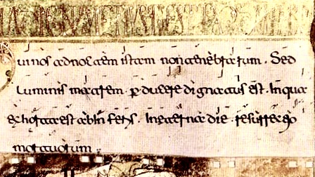 Beneventan script